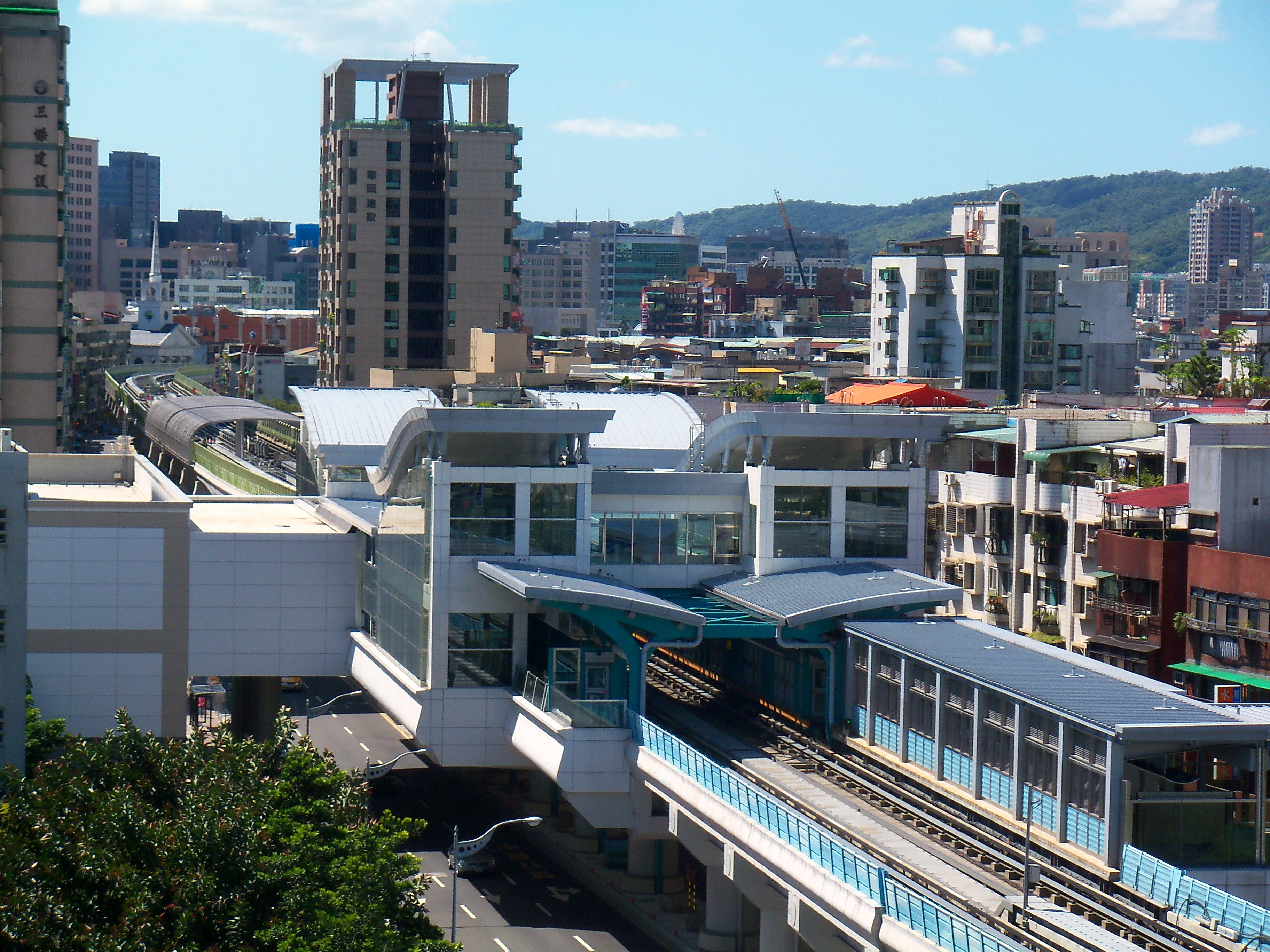 台北捷運内湖線文徳駅駅舎。